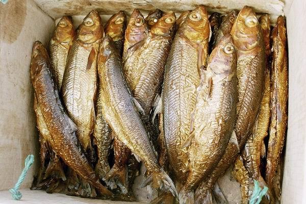 Aufnahme zeigt geräucherte Omule auf dem Fischmarkt bei Kultuk.Quellenangabe und Beleg an erbeten.